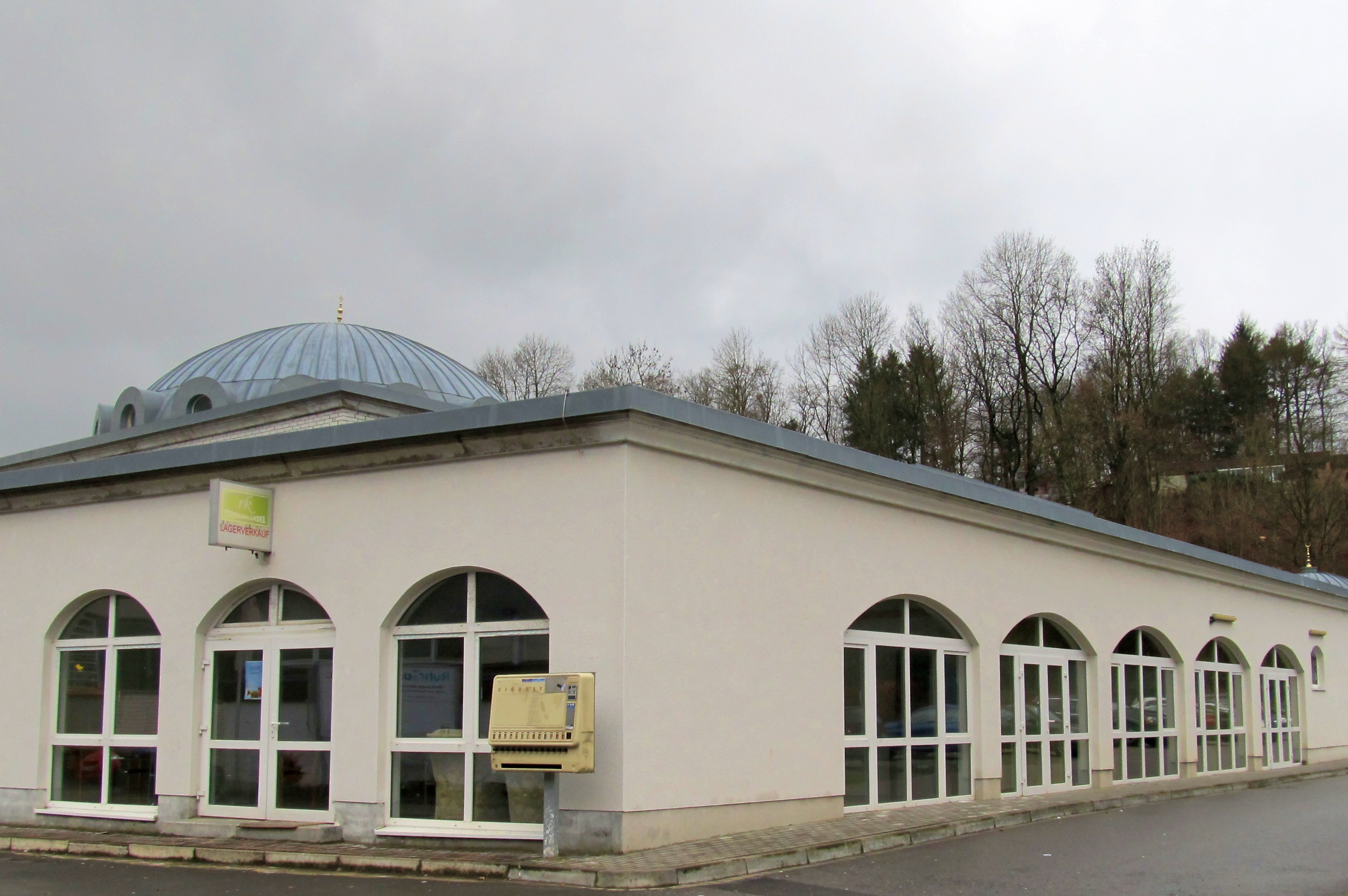 Fatih-Moschee in Meschede (Germany)